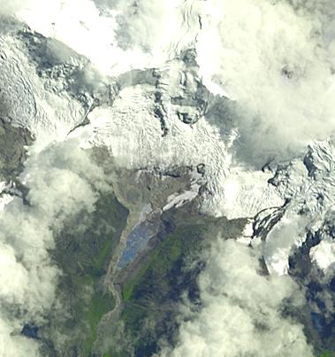 Laguna Palcacocha, Ancash Region